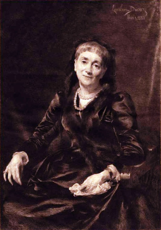 Pauline Duvernay (1813-1894)